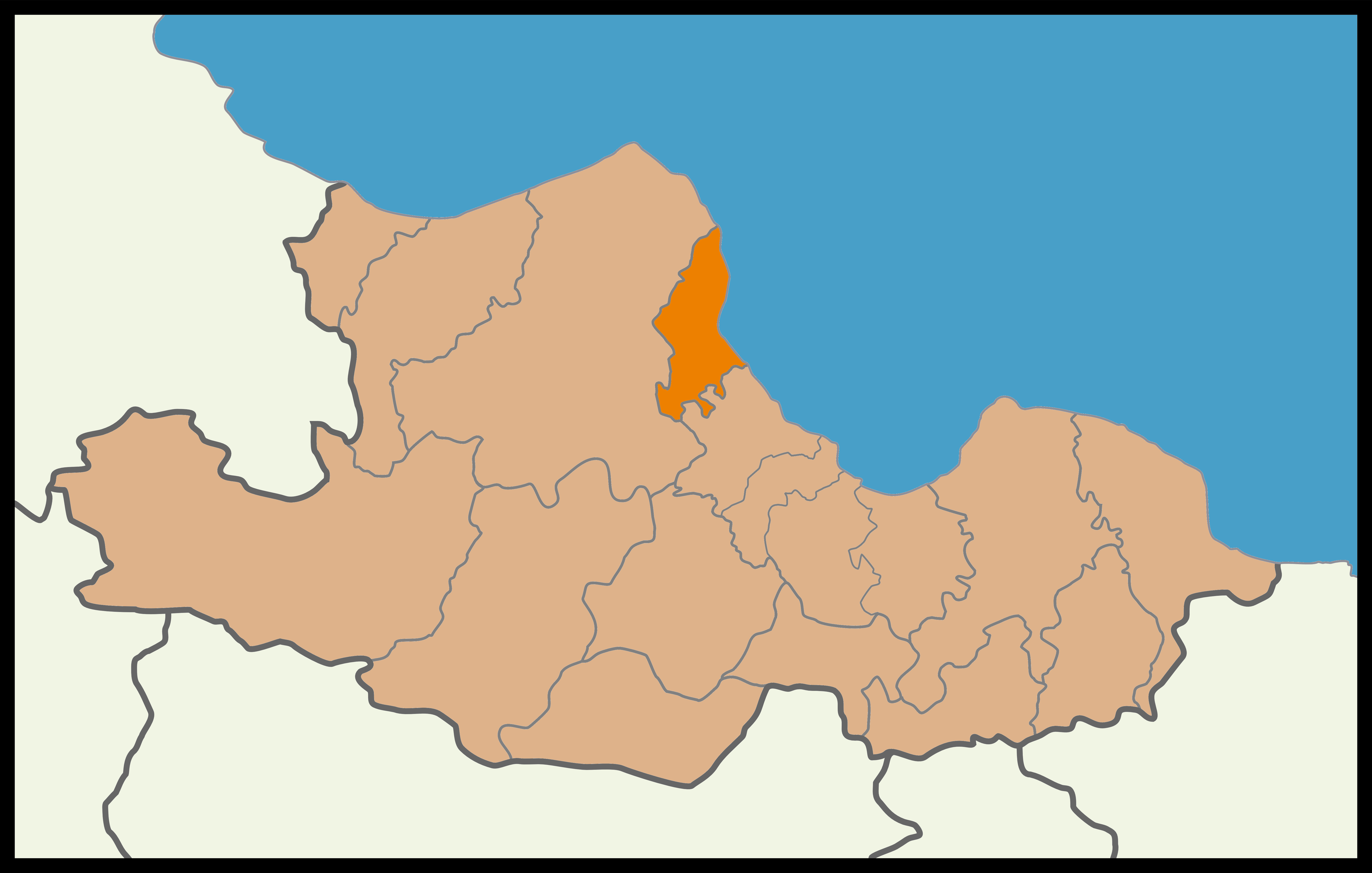 Samsun'un Ondokuzmayıs ilçesinin 2014 Türkiye yerel seçimleri haritası.